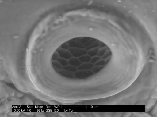 Дихальце головної воші, електронно-мікроскопічне зображення